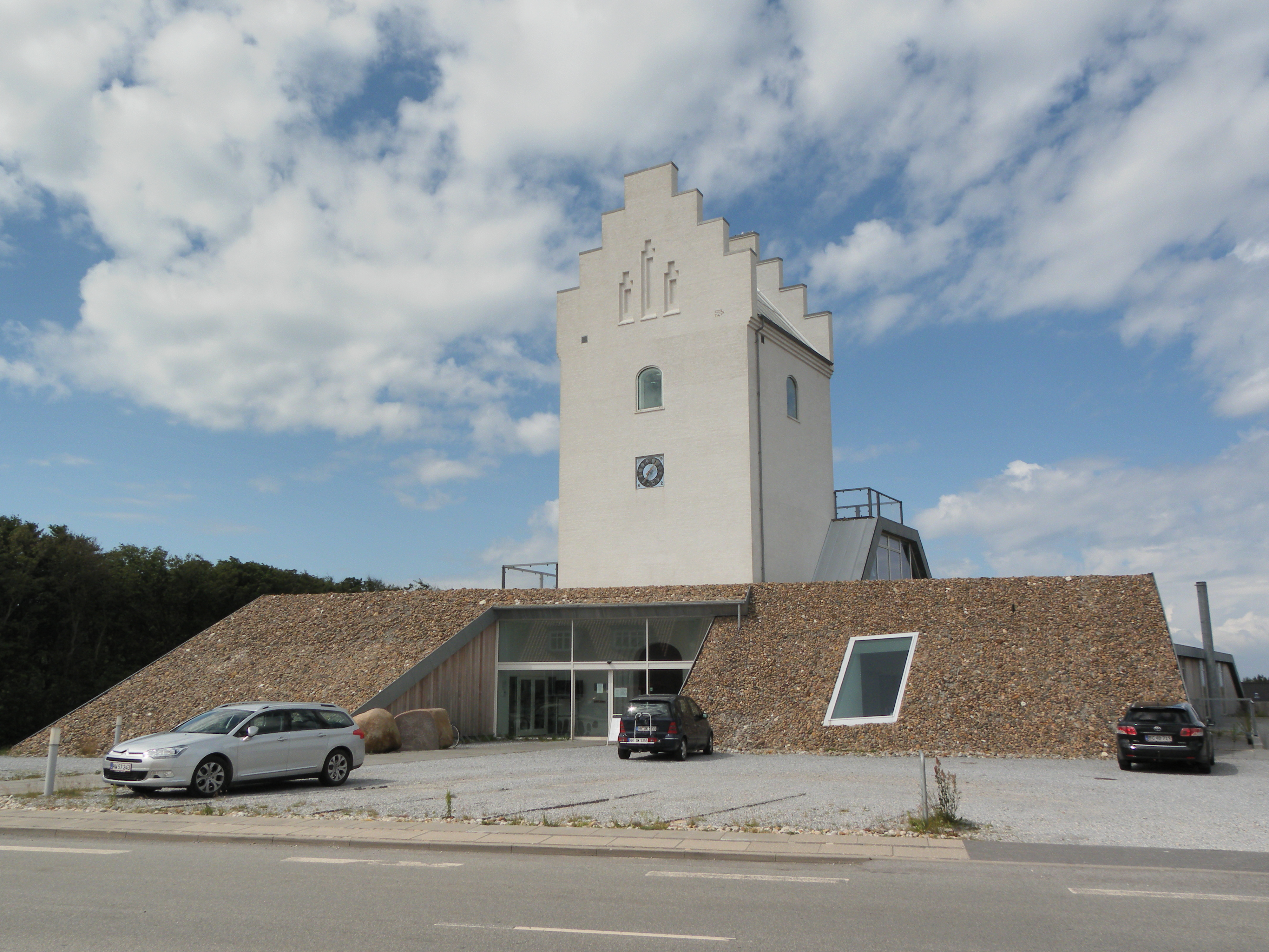 En nedlagt folkekirke, der nu bruges som kurcenter til f.eks. psoriasispatienter.